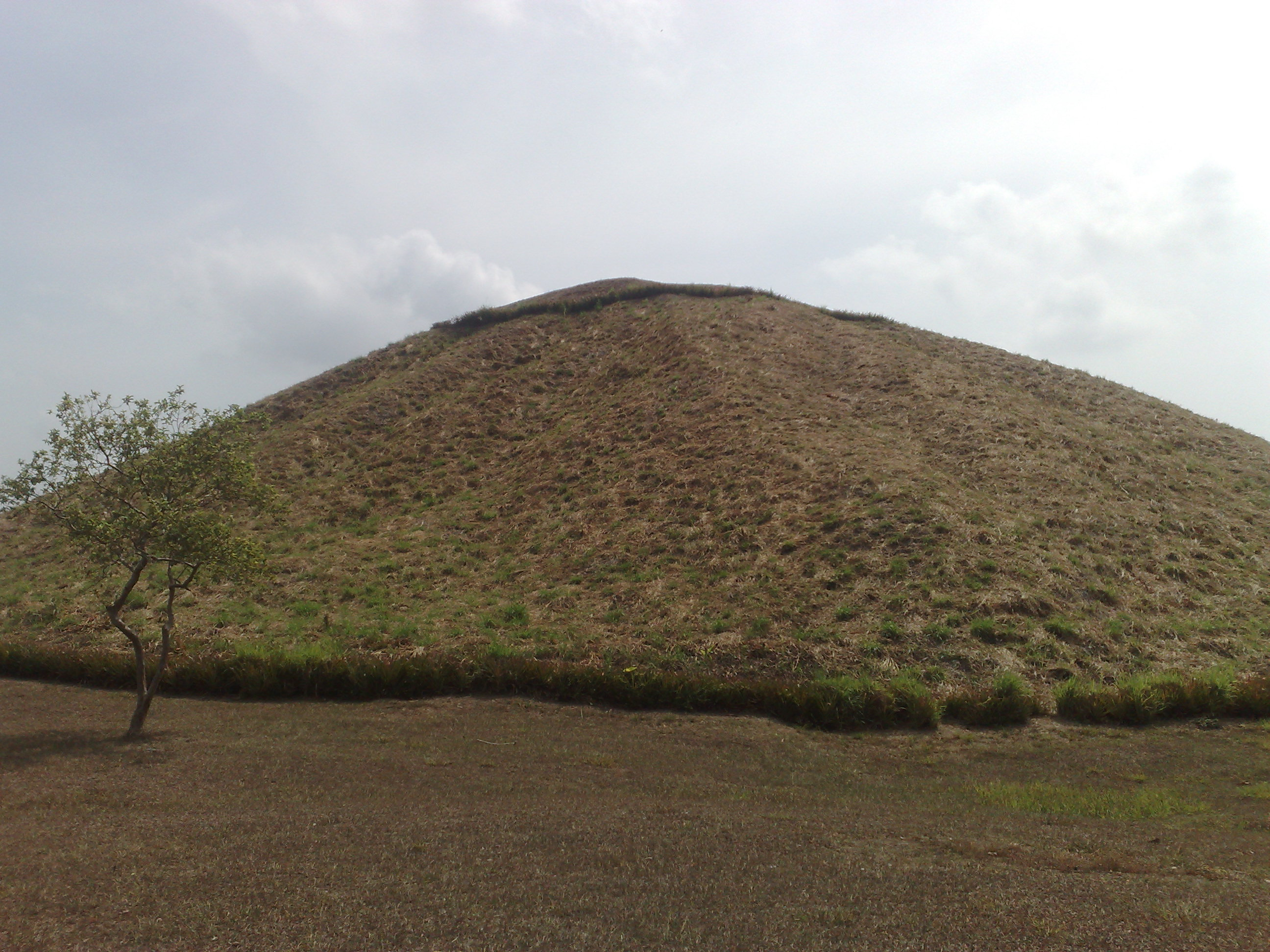 Cara sur de la pirámide de La Venta (Olmec), Tabasco, México.